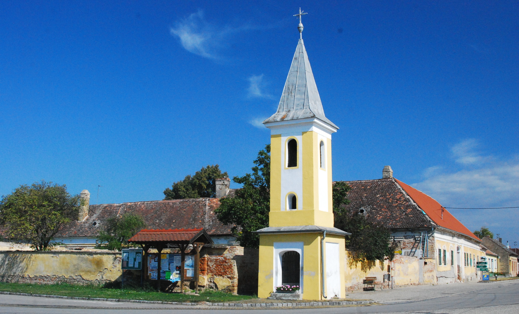 Glockenturm und Kapelle